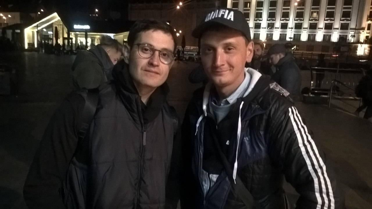 Съемки сериала Доброволец